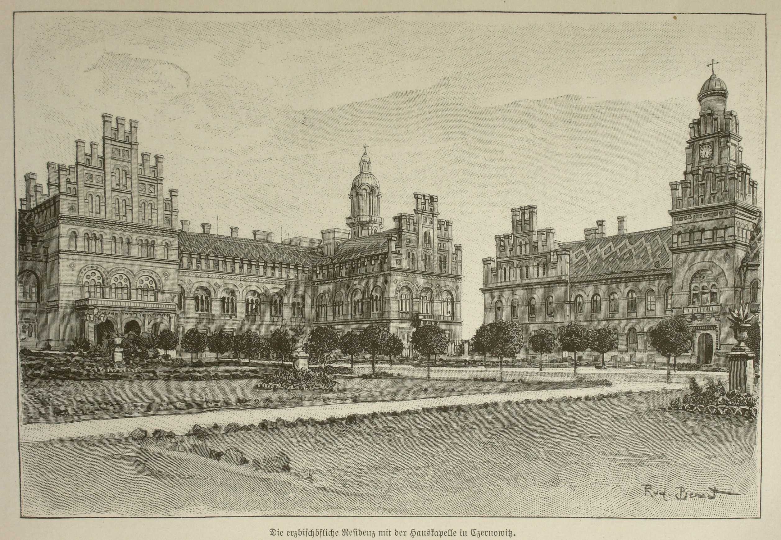 Reşedinţa mitropolitană din Cernăuţi, aprox. 1899.